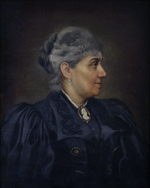 Retrato da condessa de Margaride.